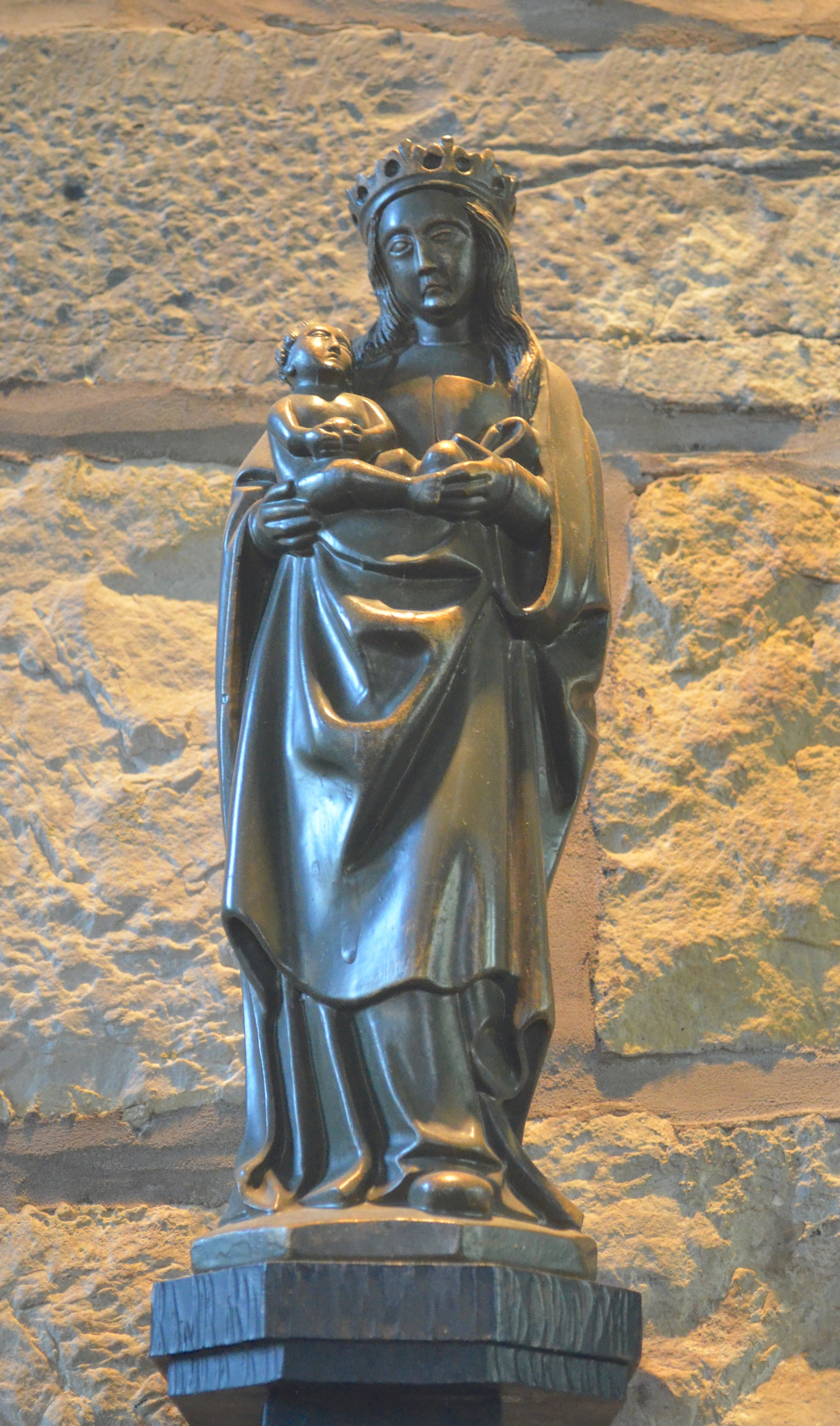 Chapelle Notre-Dame de Heigne à Jumet (Charleroi) - statuette en laiton dite de la "Vierge aux cailloux", de 33 cm de hauteur (début du XVe siècle). La Vierge, debout, tient dans ses bras l'Enfant Jésus qui serre dans ses deux mains une pomme tandis que la Vierge elle-même tient un fruit semblable. Ces pommes ont sans doute été mal identifiées par les fidèles, d'où le nom de "Vierge aux cailloux".